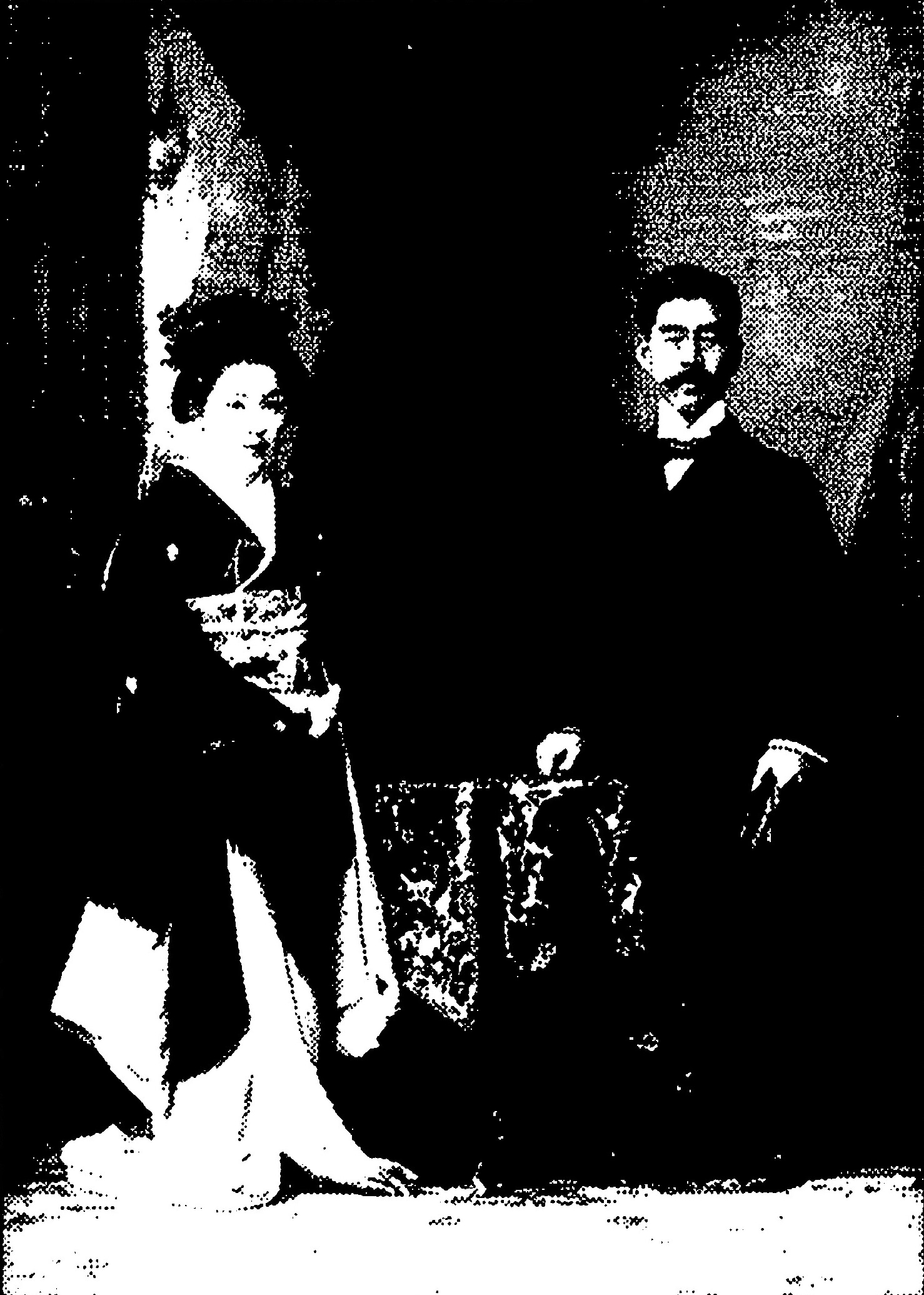 山川幸雄・山川柳子夫妻